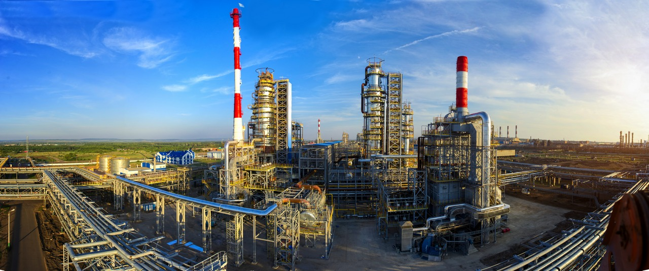 Газпром нефтехим Салават